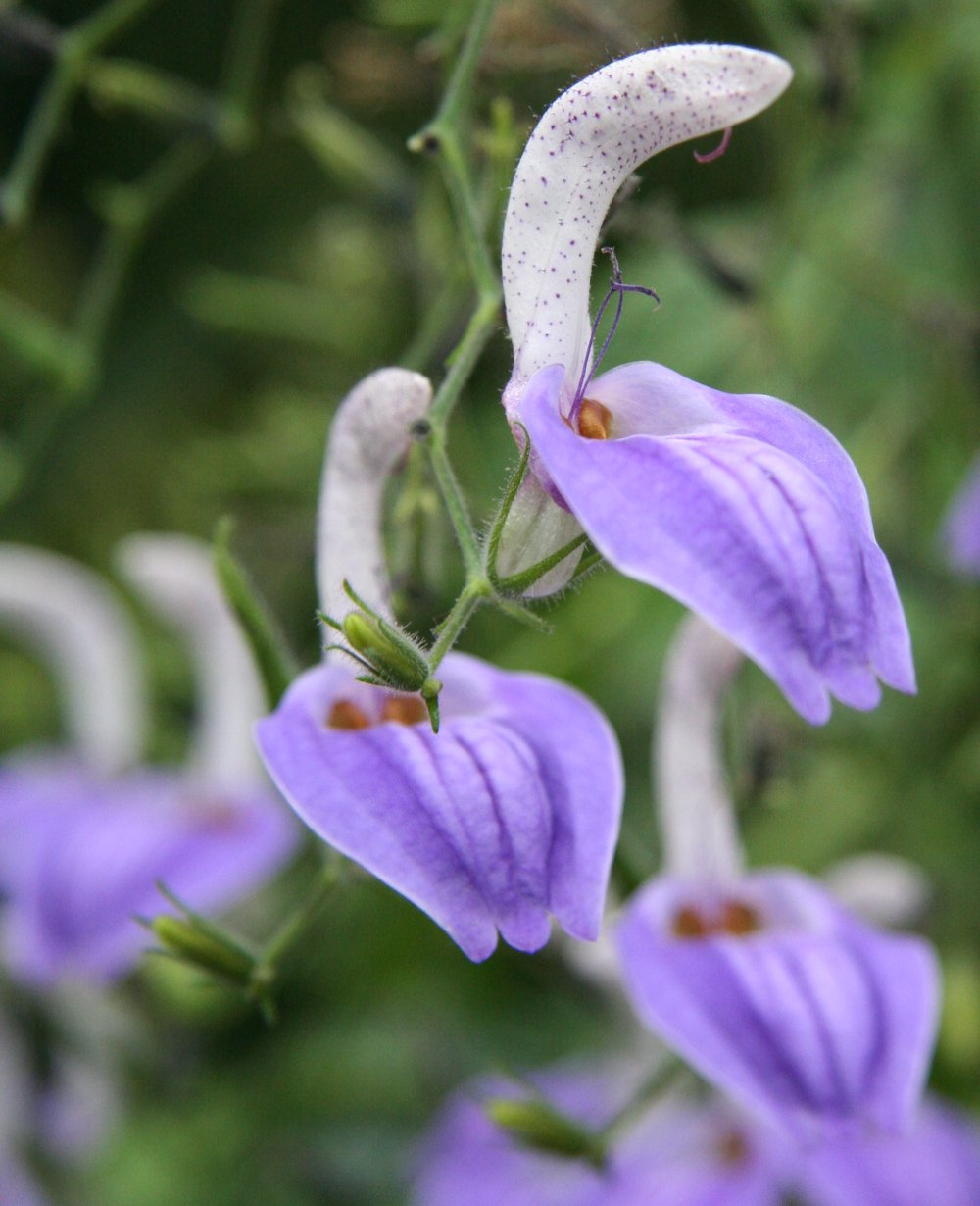 Blüte von Brillantaisia nyanzarum